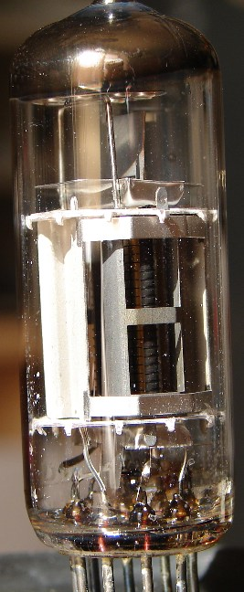 Spanngitter-Beam-Power Endpentode PL802